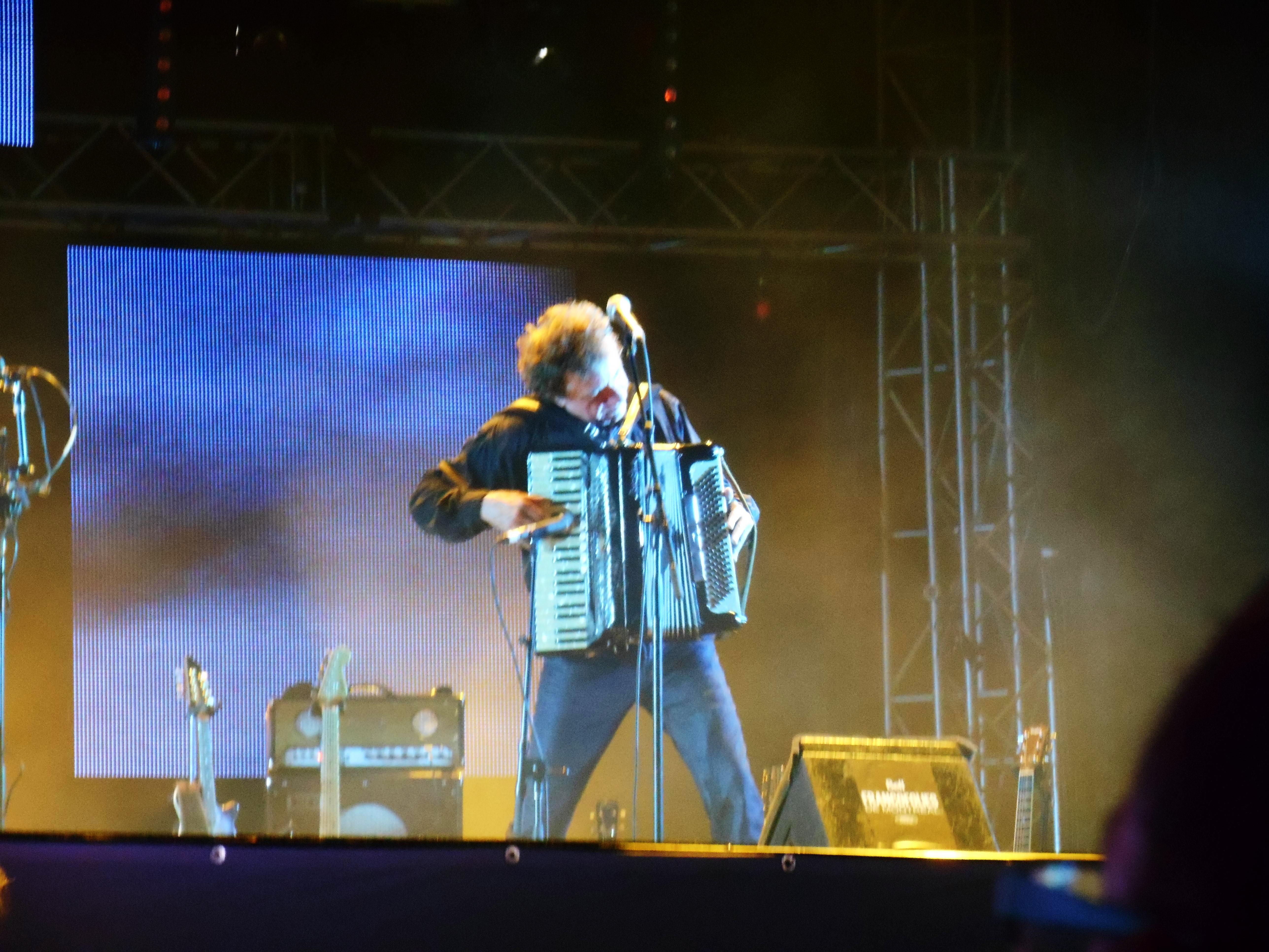 Le groupe Vilain Pingouin a offert une performance aux FrancoFolies de Montréal, le 13 juin 2014, à la place des Festivals.